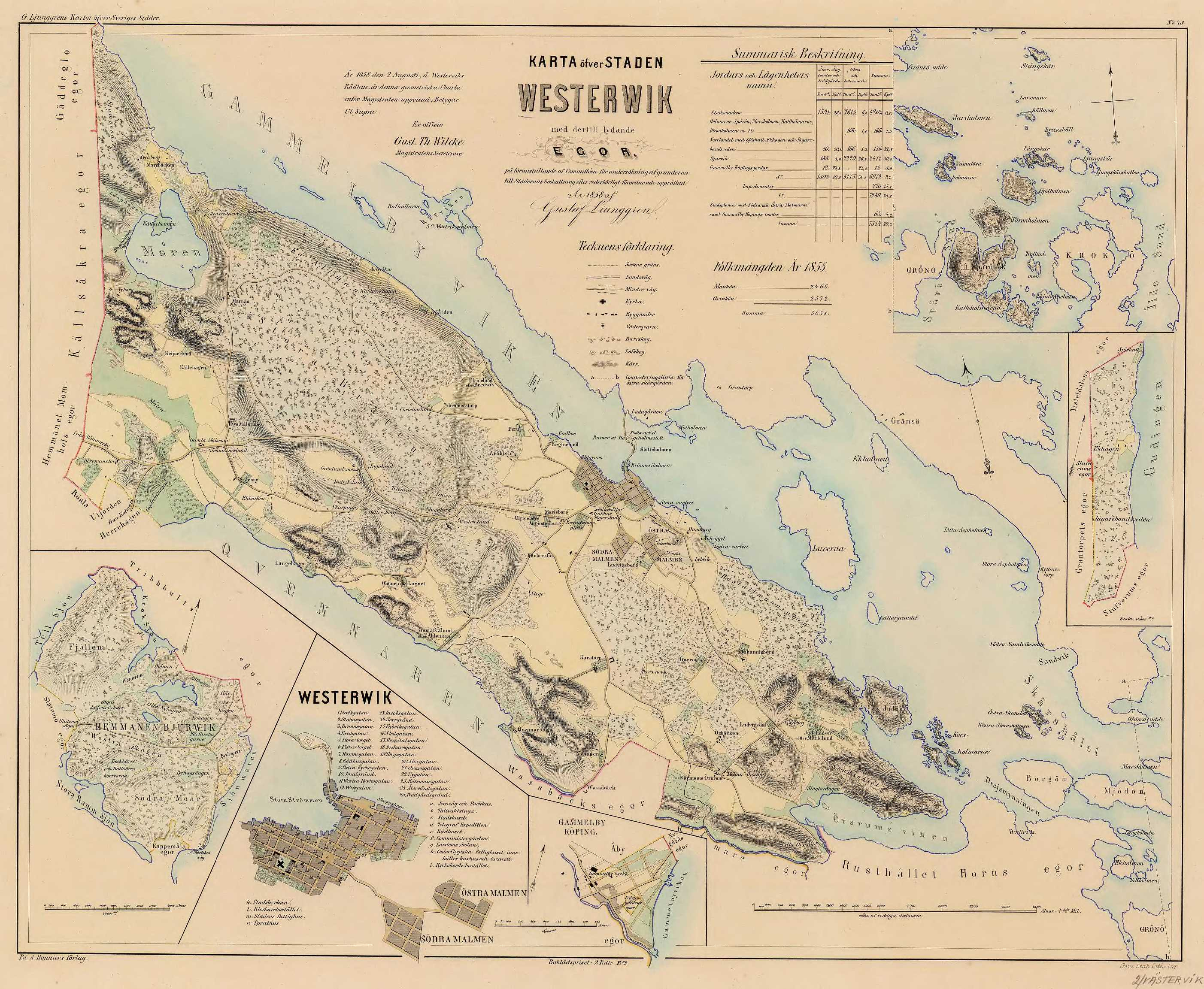 Karta över Västervik från 1850-talet av Erik Gustaf Ljunggren ifrån samlingen Atlas öfver Sveriges städer med deras ägor.